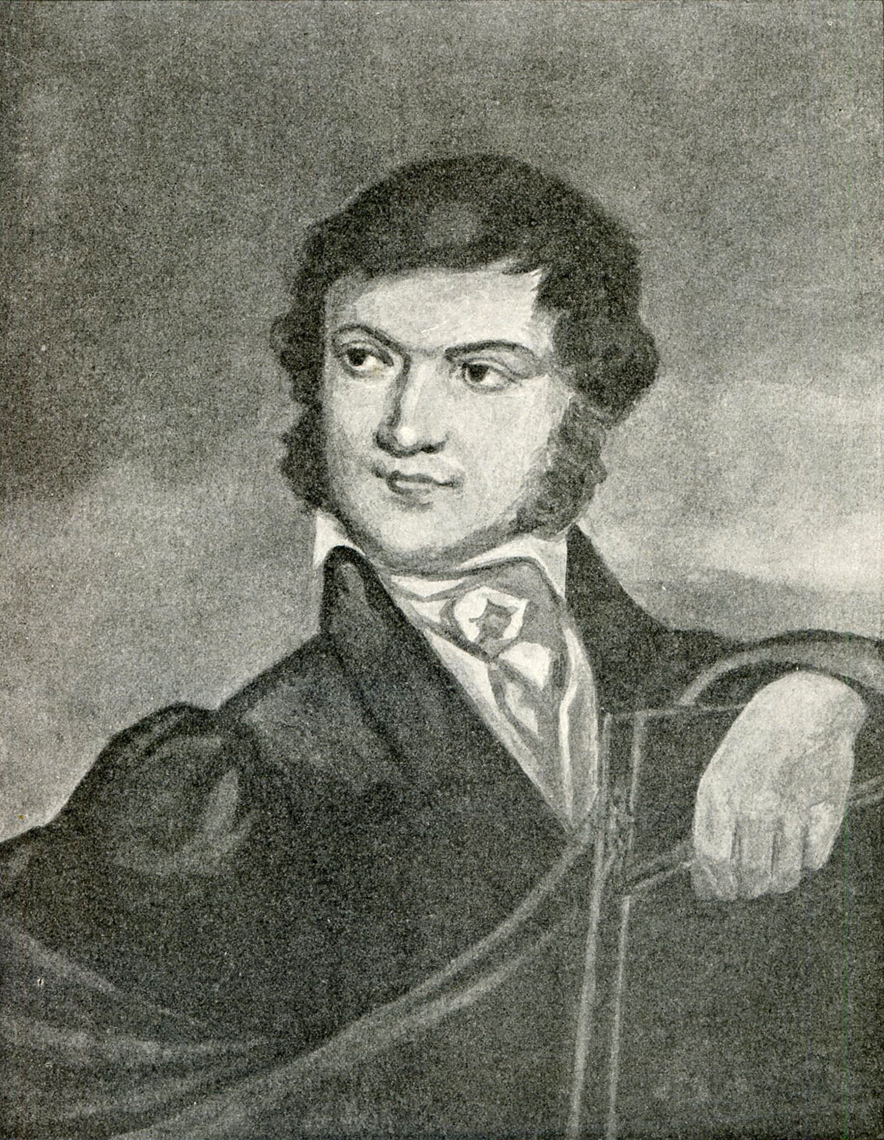 Беларуская (тарашкевіца): Партрэт Вінцэнта Дмахоўскага (Vincent Dmachoŭski)